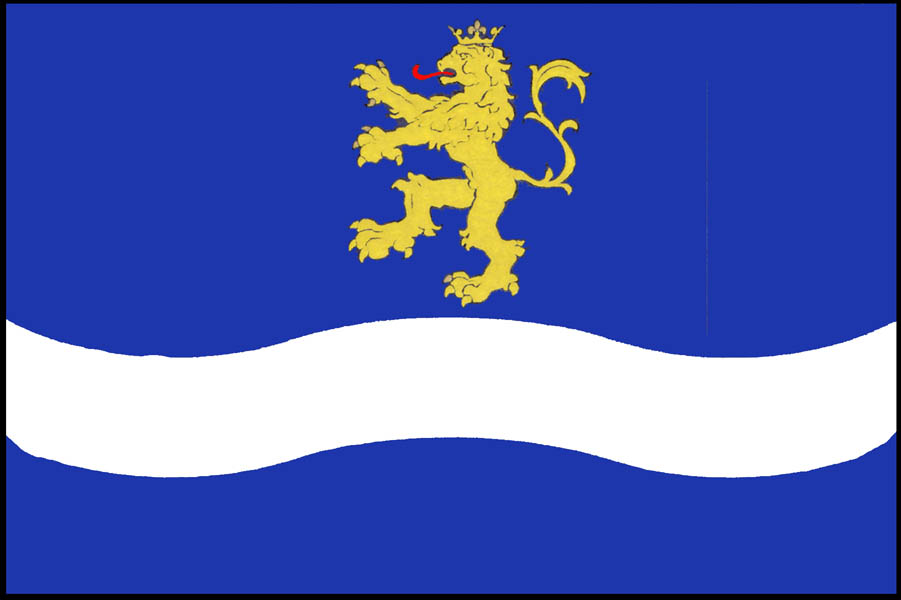 Vlajka obce Chocerady